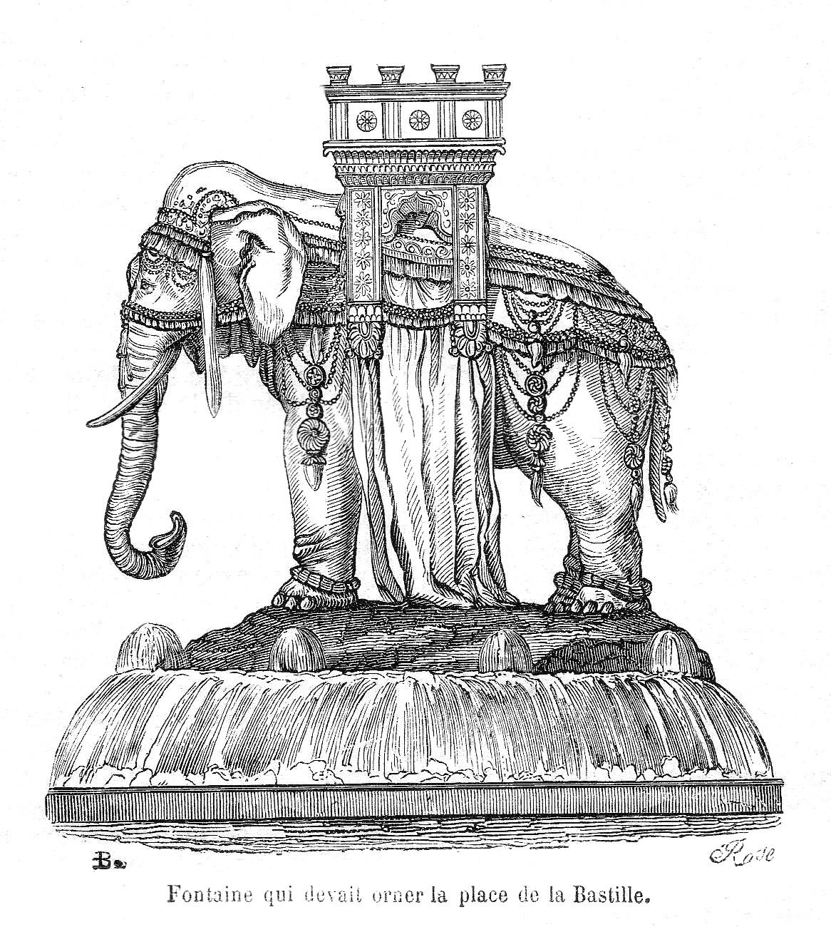 Statue d'un éléphant monumental que Napoléon 1er voulait faire ériger place de la Bastille à Paris en 1808